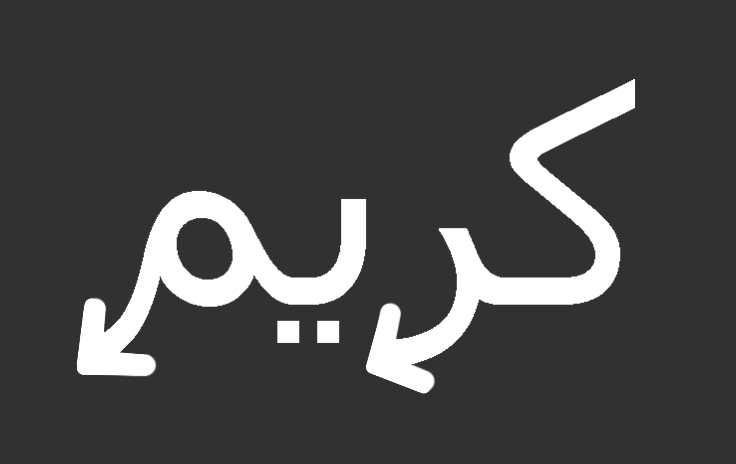 الاسم كريم